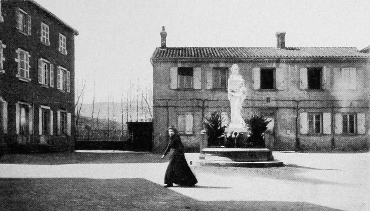 Dictionnaire illustré des communes du département du Rhône. Tome 2 / par MM. E. de Rolland et D. Clouzet.